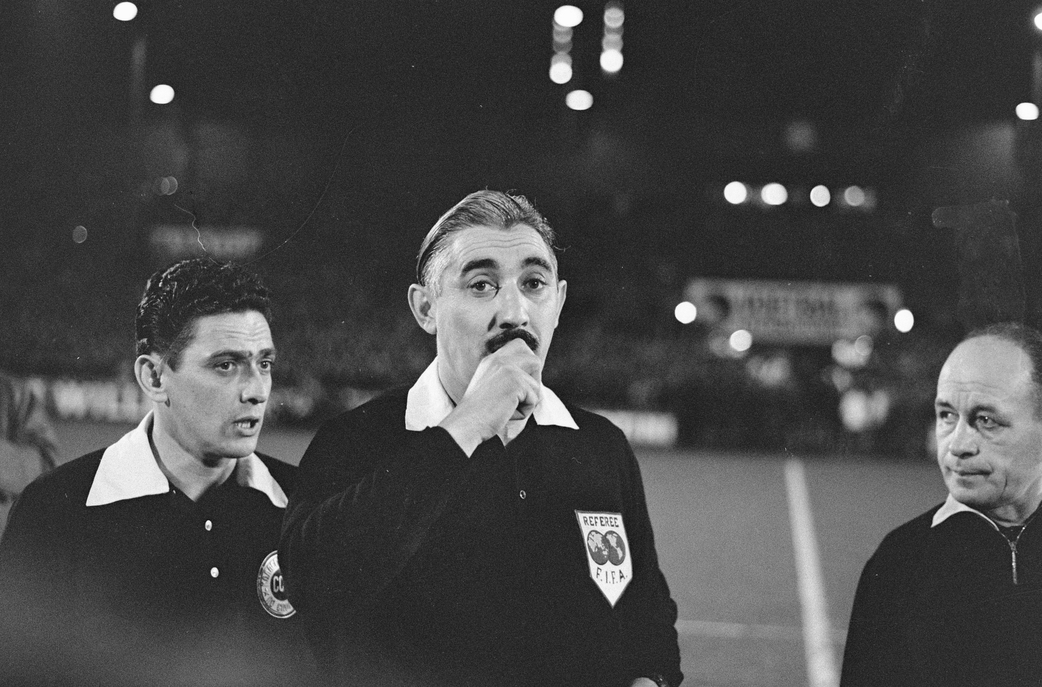 Ajax tegen Dukla Praag 1-1. Scheidsrechter Bakhramov